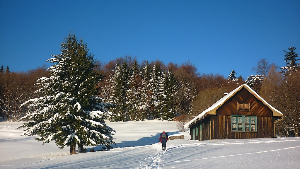 Gronštolne, časť chotára obce Prochot